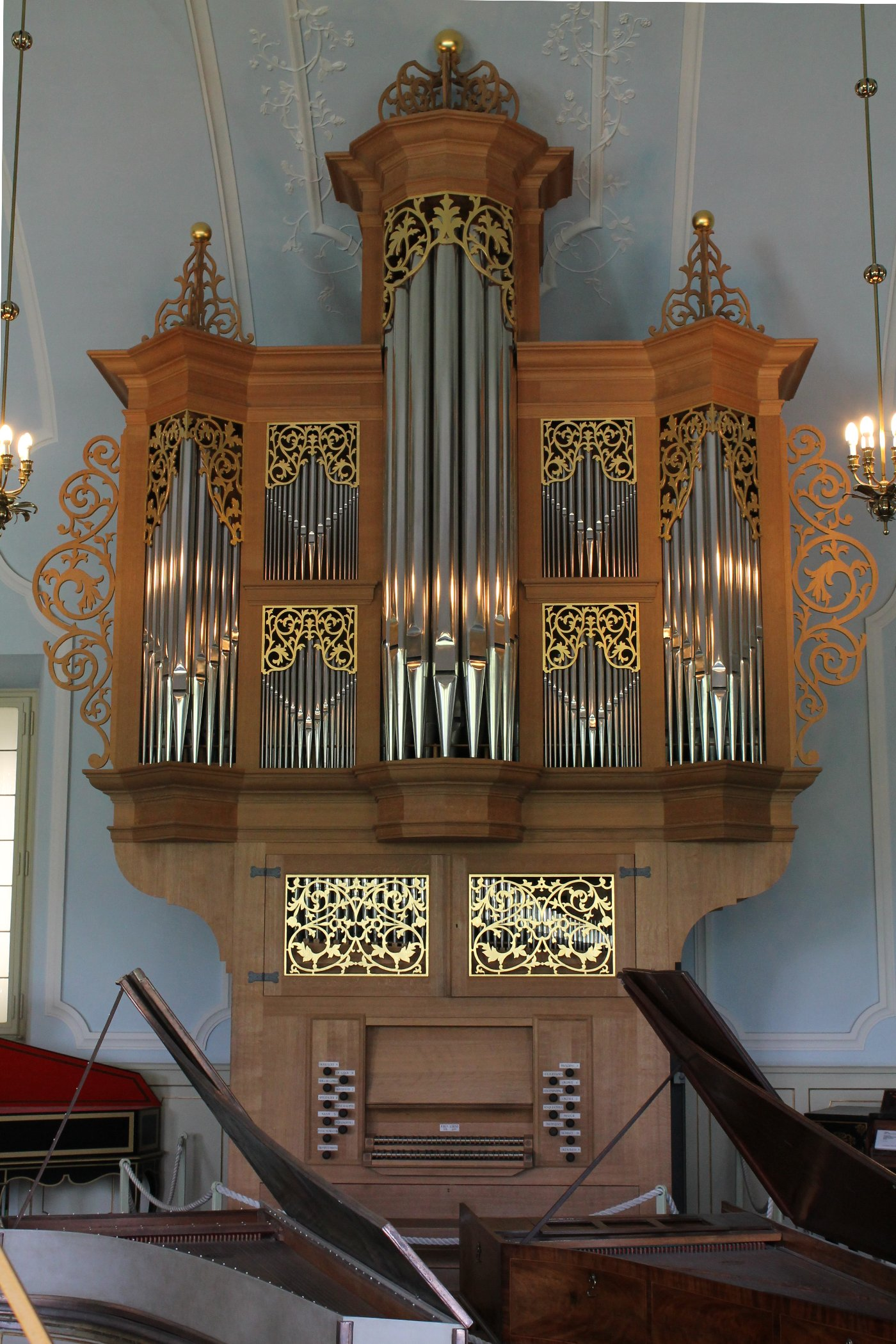 Die Ahrend-Orgel im Deutschen Museum, München (1995, Jürgen Ahrend, II/17)